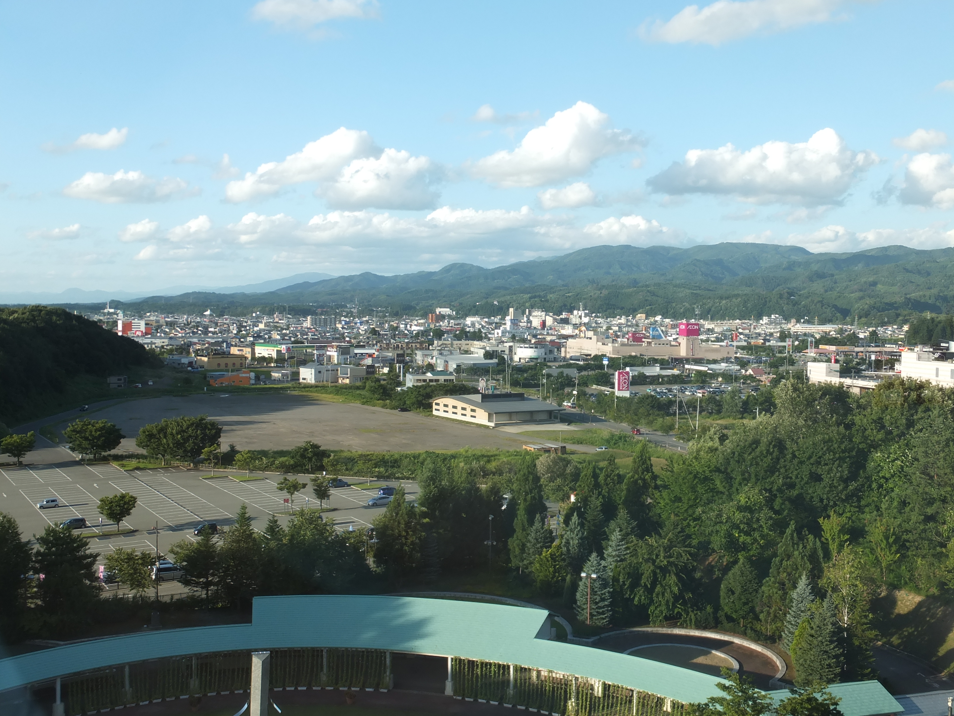 秋田県立近代美術館から見た横手市街